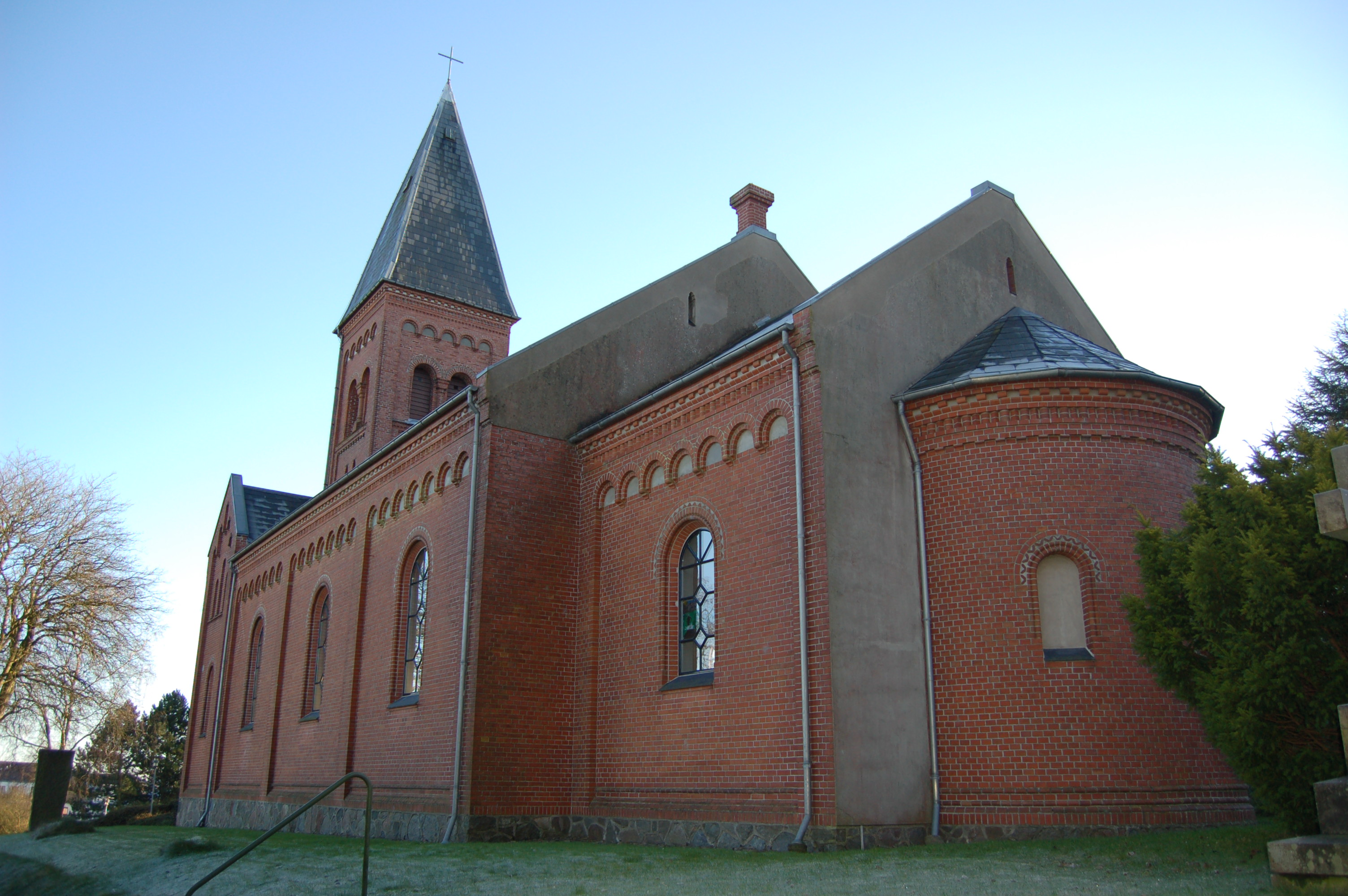 Church in Aarup, Denmark